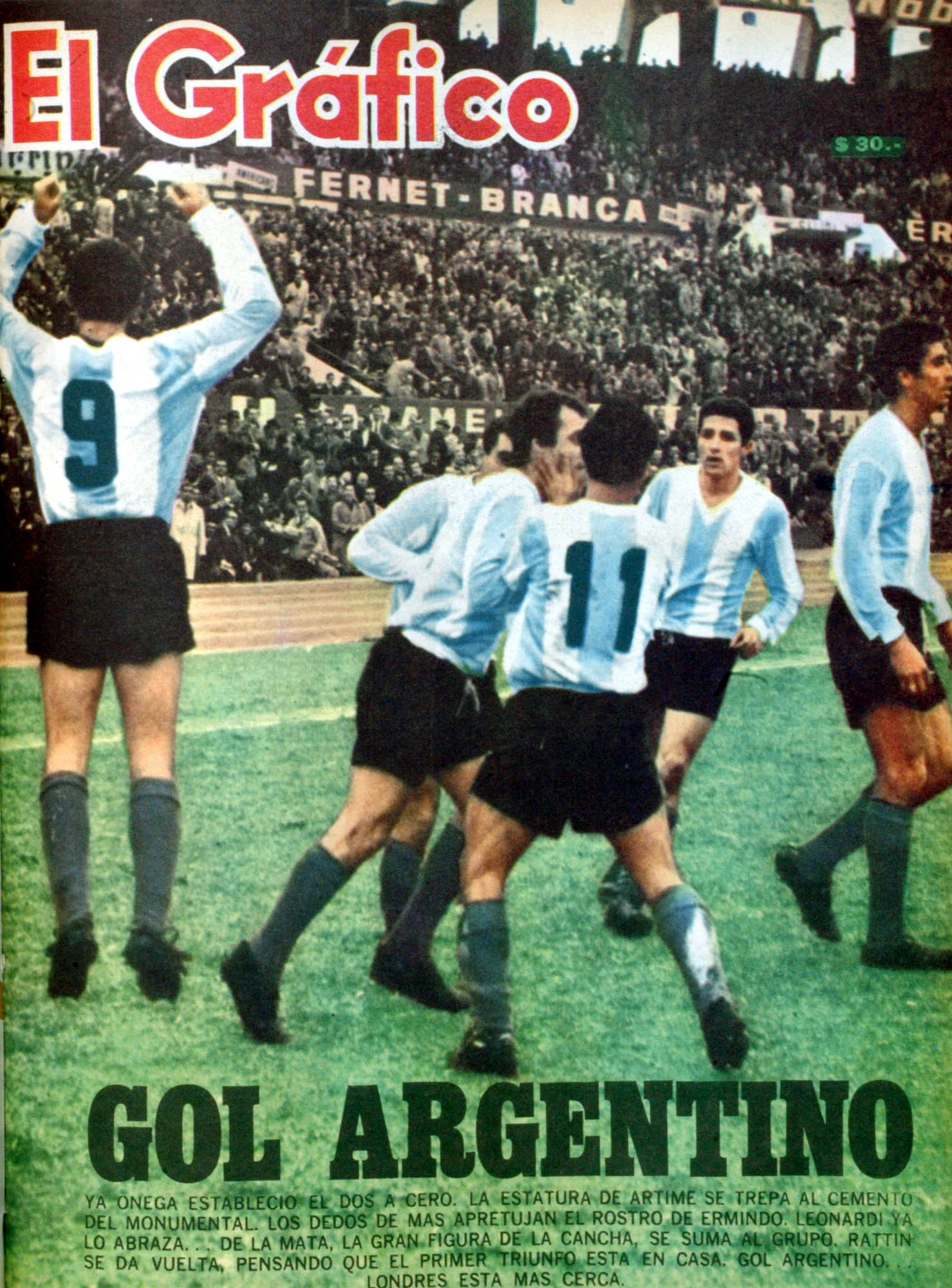 El Grafico del 03 de Agosto de 1965. Edicion 2391